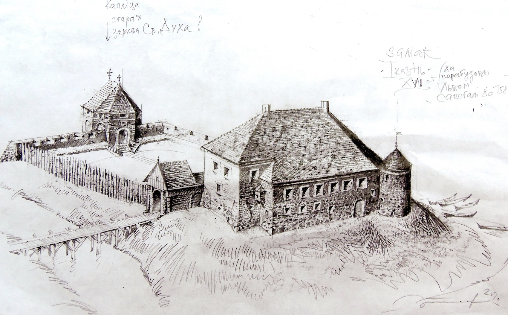 Замак Іказнь, Замак, першая палова (будаўніцтва Івана Сапегі) - сярэдзіна XVI ст. Мастацкая рэканструкцыя П. Татарнікава па натхняльнай прапанове Алеся Краўцэвіча і матэрыялах М. Ткачова і М. Волкава.